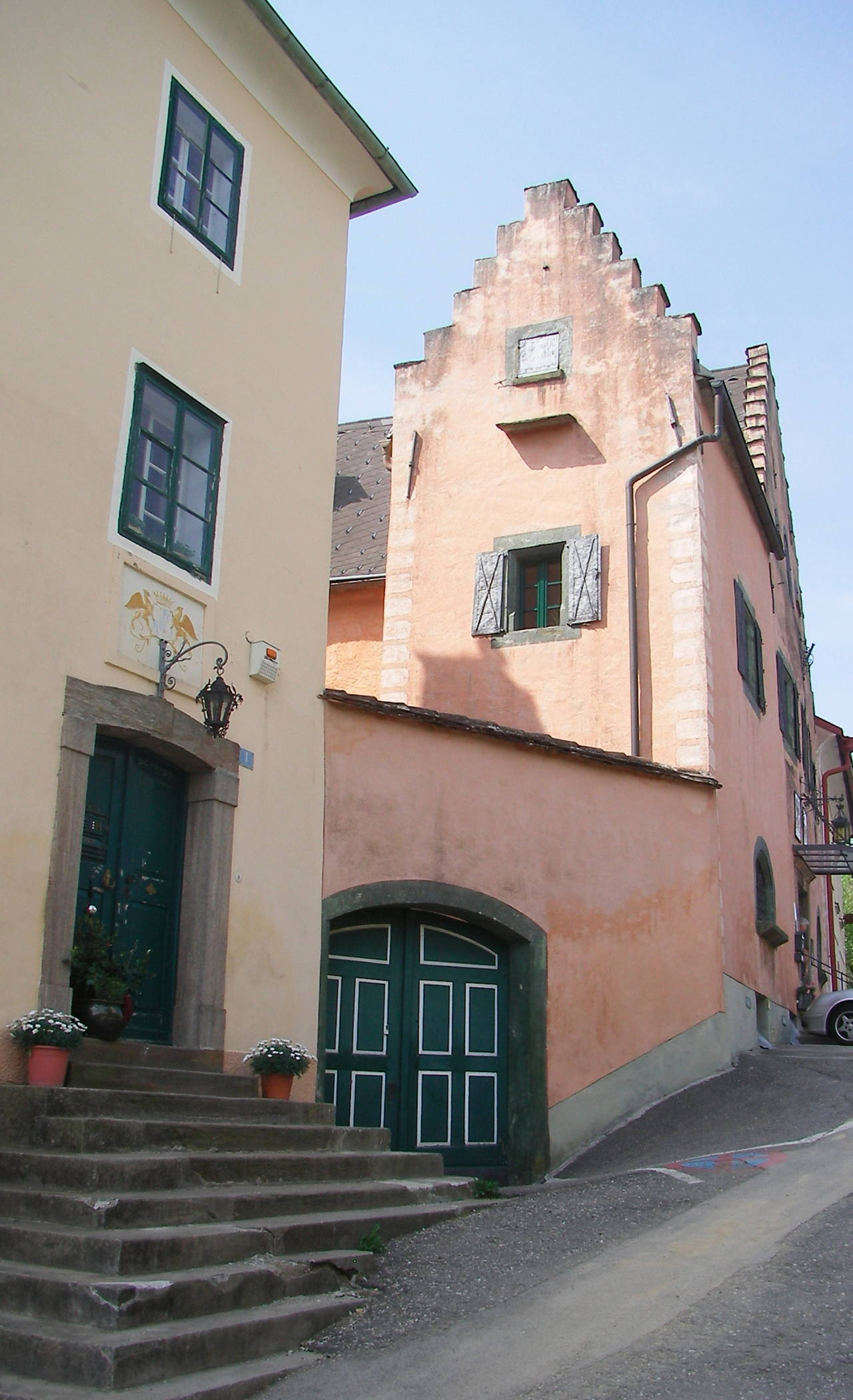 Althofen, historische Gebäude